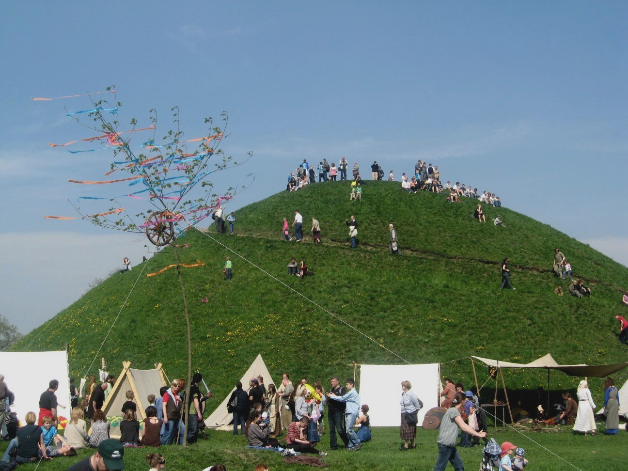 Rękawka pod Kopcem Krakusa